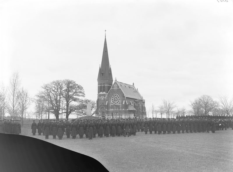 Gustav Adolfs kyrka från väster Referenser Upphov: Okänd. Tid: 1902 Beteckning: Fotonummer D 107